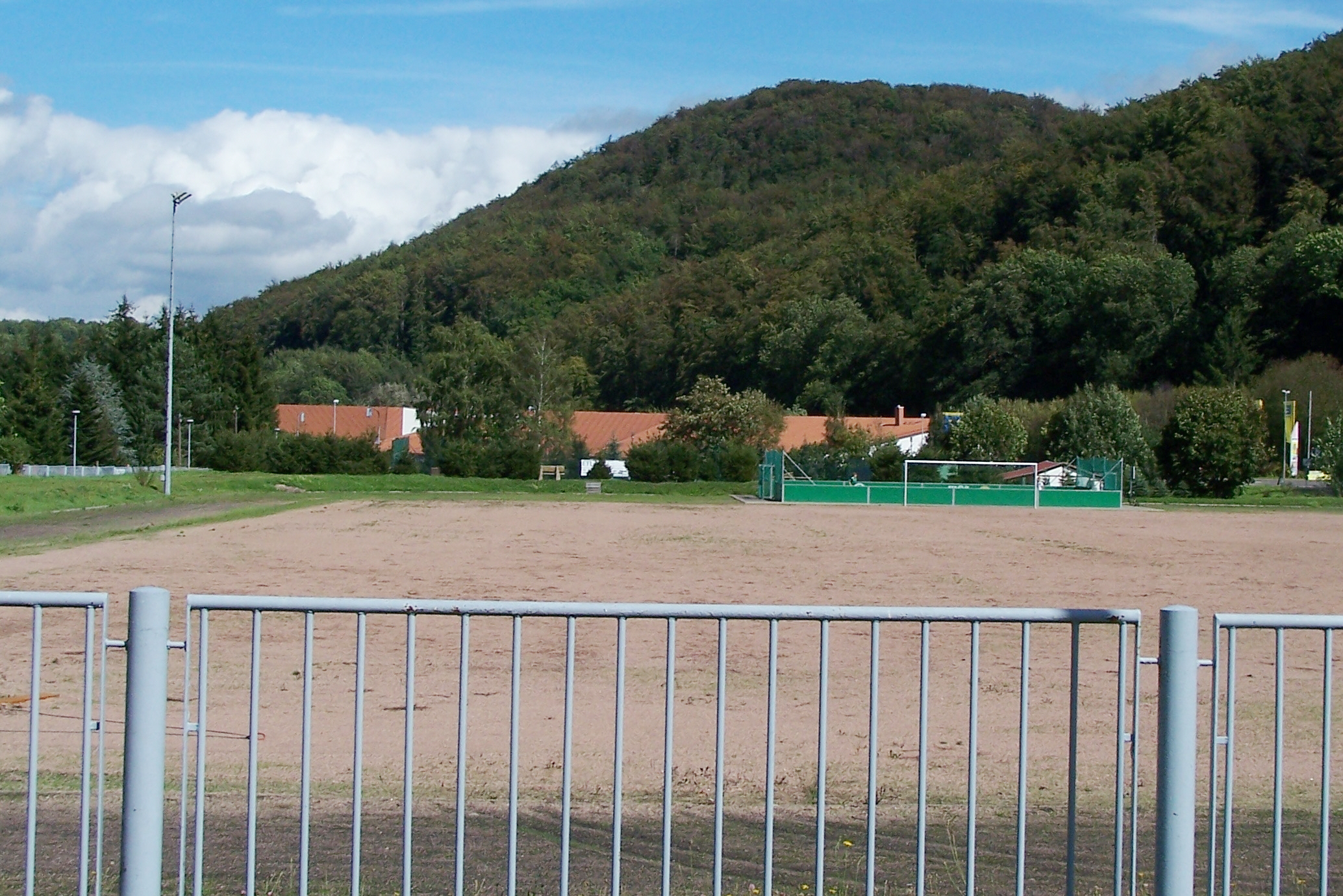 Der in der Flur Farnroda befindliche Große Ebertsberg, Ansicht vom Sportplatz Thal.